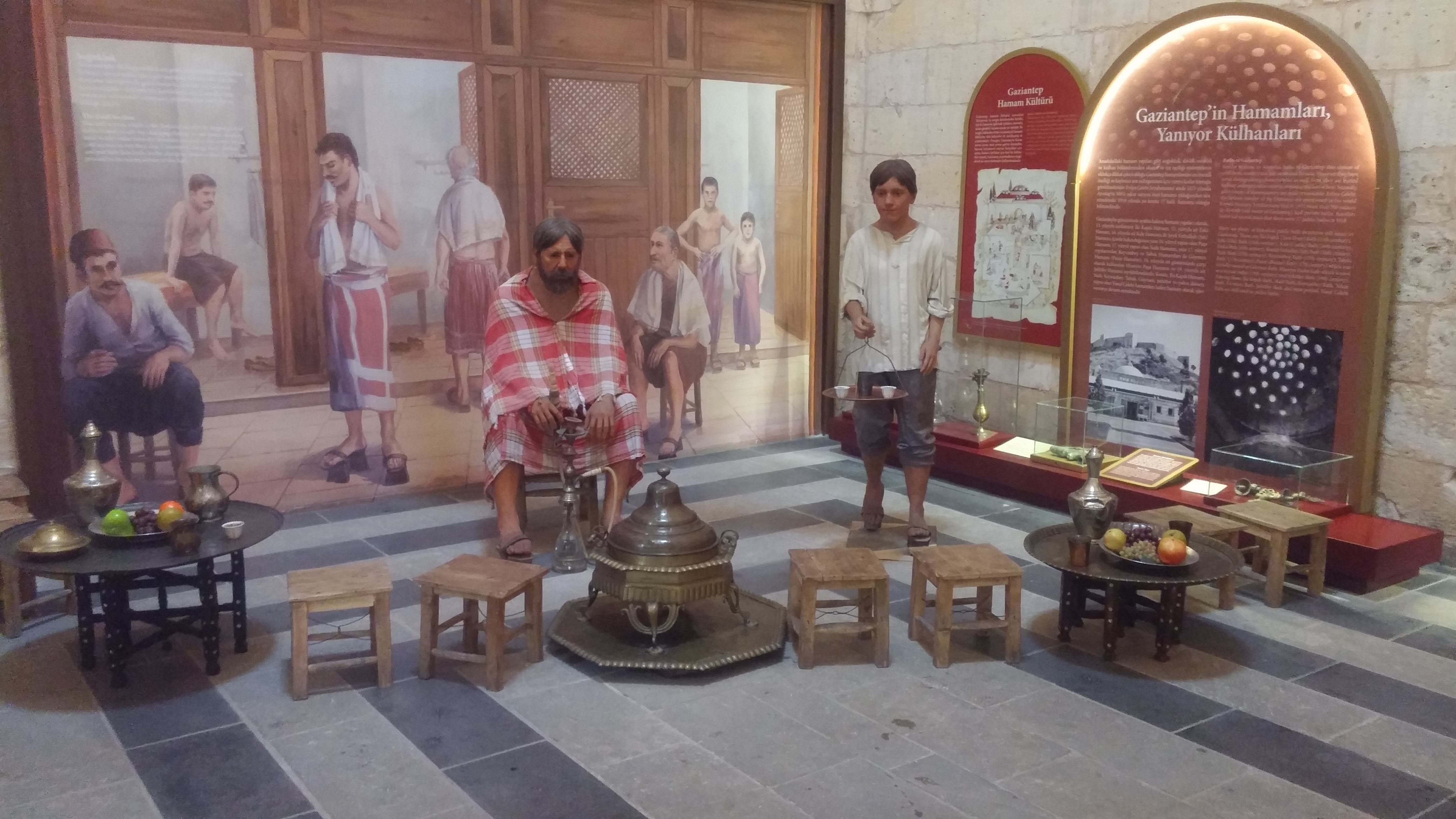 Paşa Hamamı